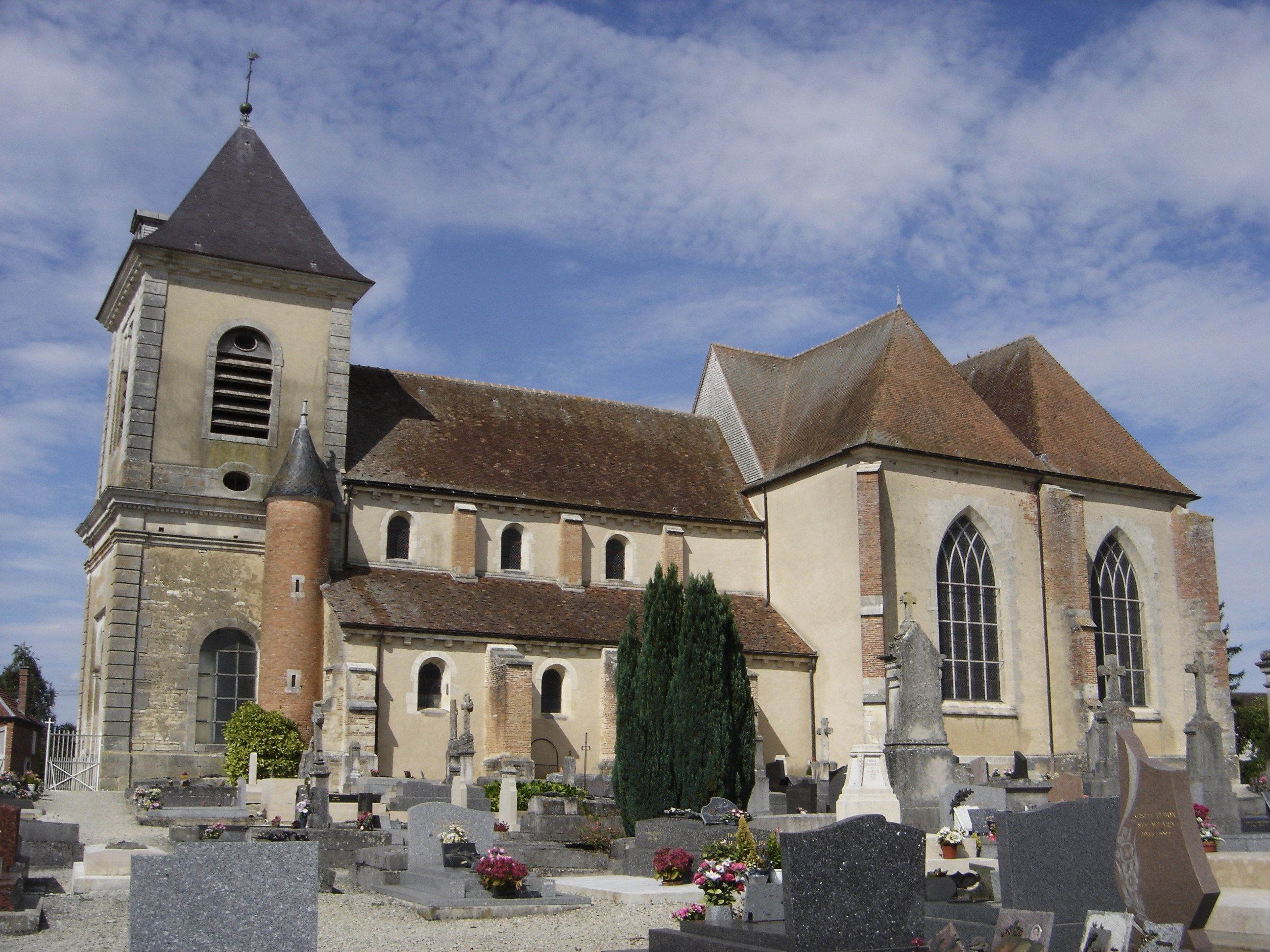 église Notre-Dame-de-l'Assomption - Montiéramey - Aube - France